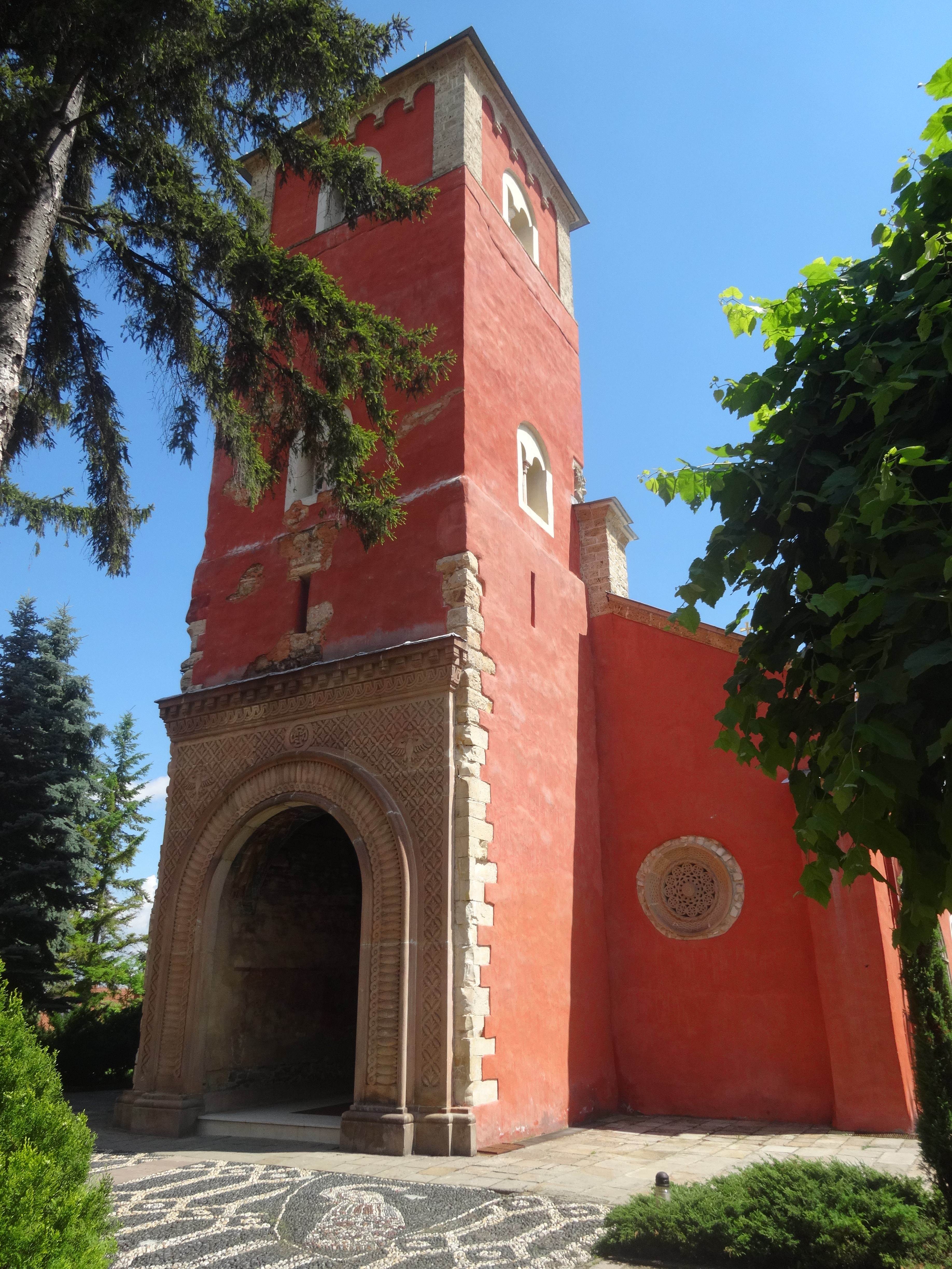 Жича је српски средњовековни манастир из прве половине 13. века, који се налази у близини Краљева. Подигао ју је први краљ Србије, Стефан Немањић.